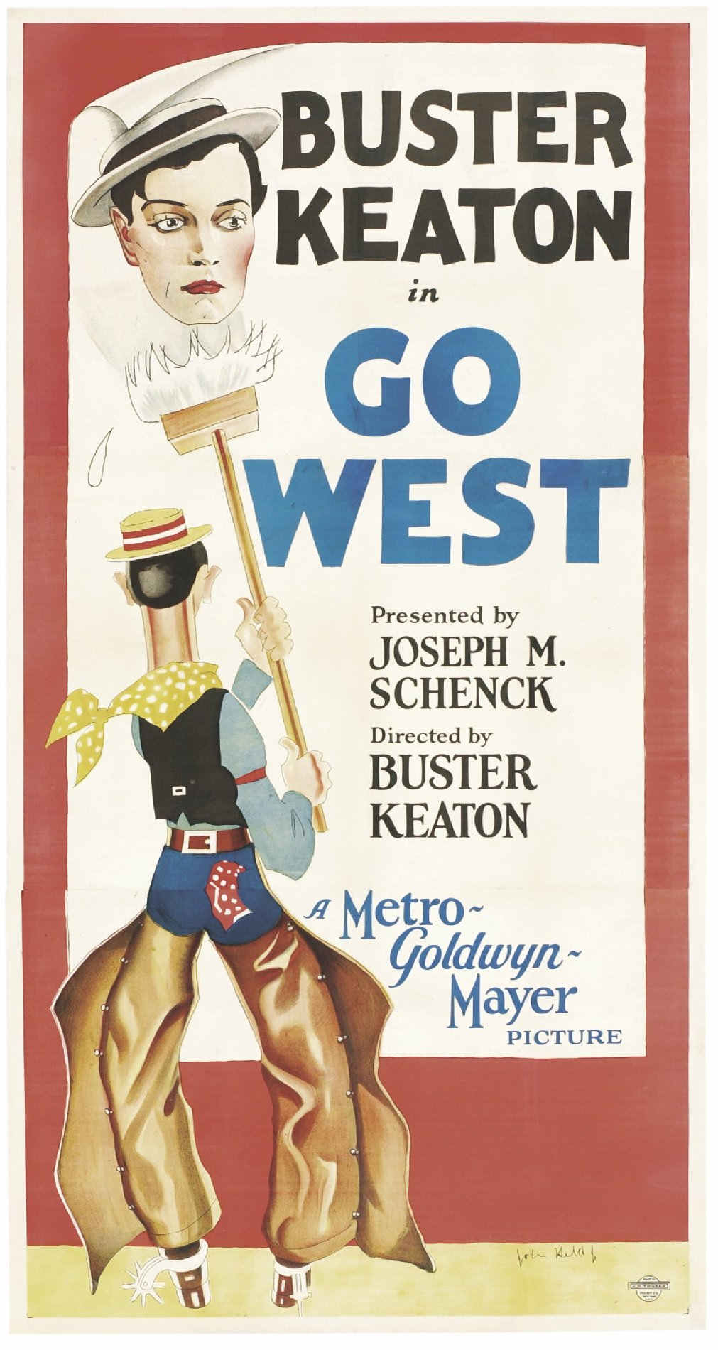 Go West, en France Ma vache et moi, est un film américain de Buster Keaton sorti en 1925.